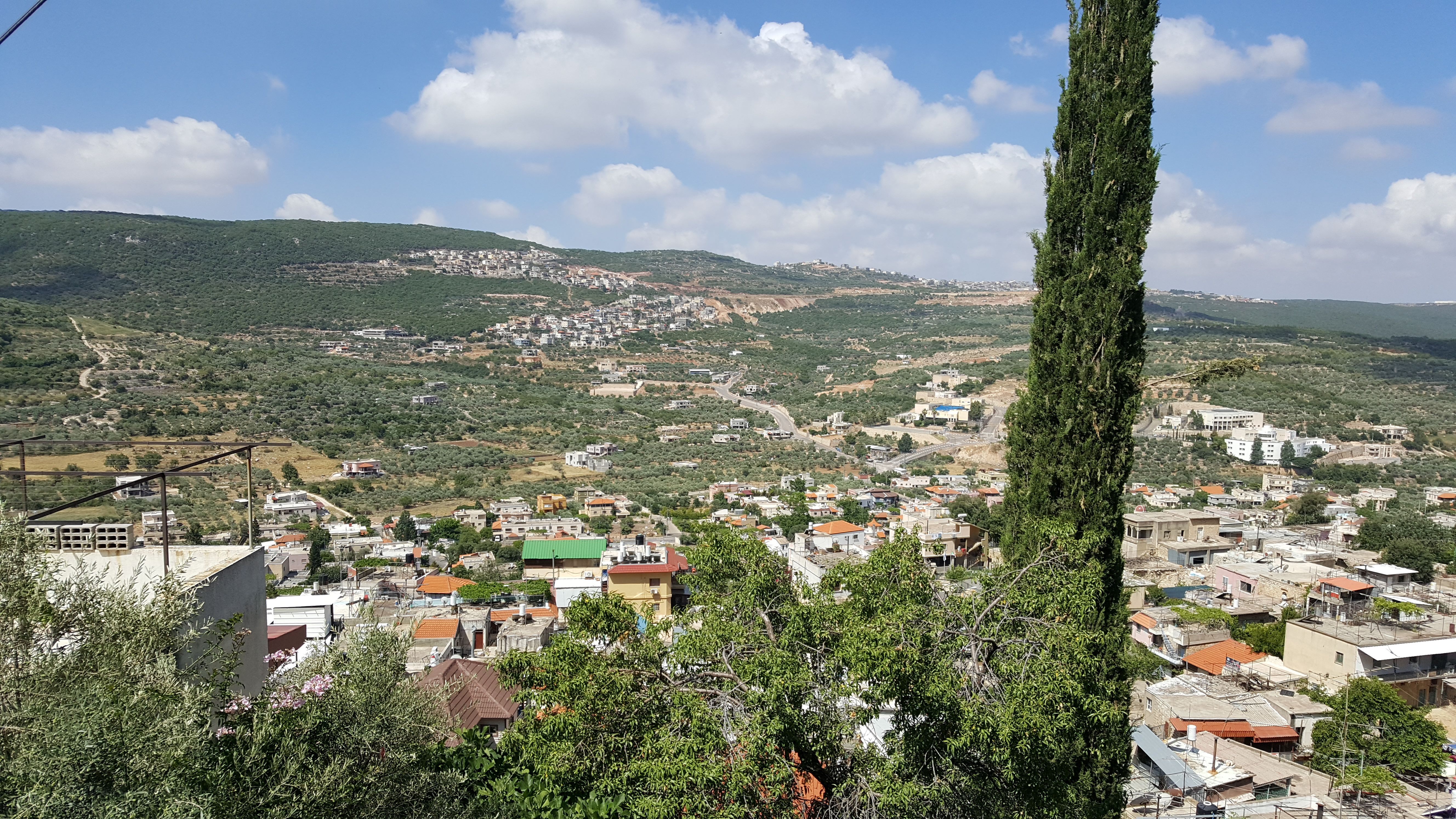 מרכז מבקרים המנוהל על ידי עמותה, ששימורו החל לפני כעשור שנים. המרכז ממוקם במבנה הקרוי "בית רחל ינאית" על שמה של רעיית נשיא מדינת ישראל לשעבר, רחל ינאית בן-צבי. תפקידו של המרכז להנציח ולשמר את מורשת יהודי פקיעין ואת מורשת משפחת זינאתי עתיקת-היומין. מרגלית זינאתי, הנצר האחרון למשפחה, מתגוררת במבנה ושומרת על בית הכנסת העתיק בפקיעין הממוקם בסמוך.